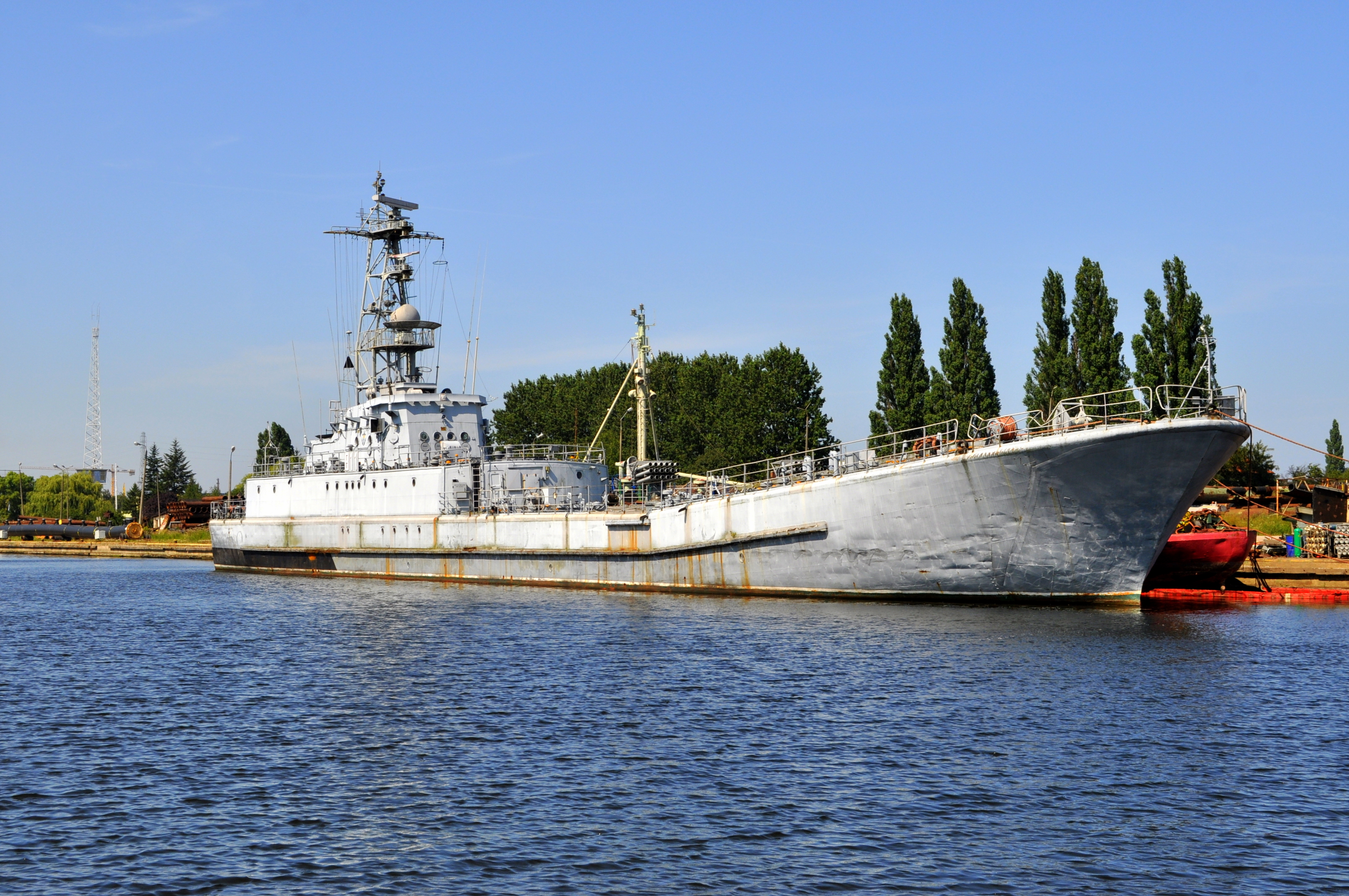 ORP Grunwald w Gdańsku.